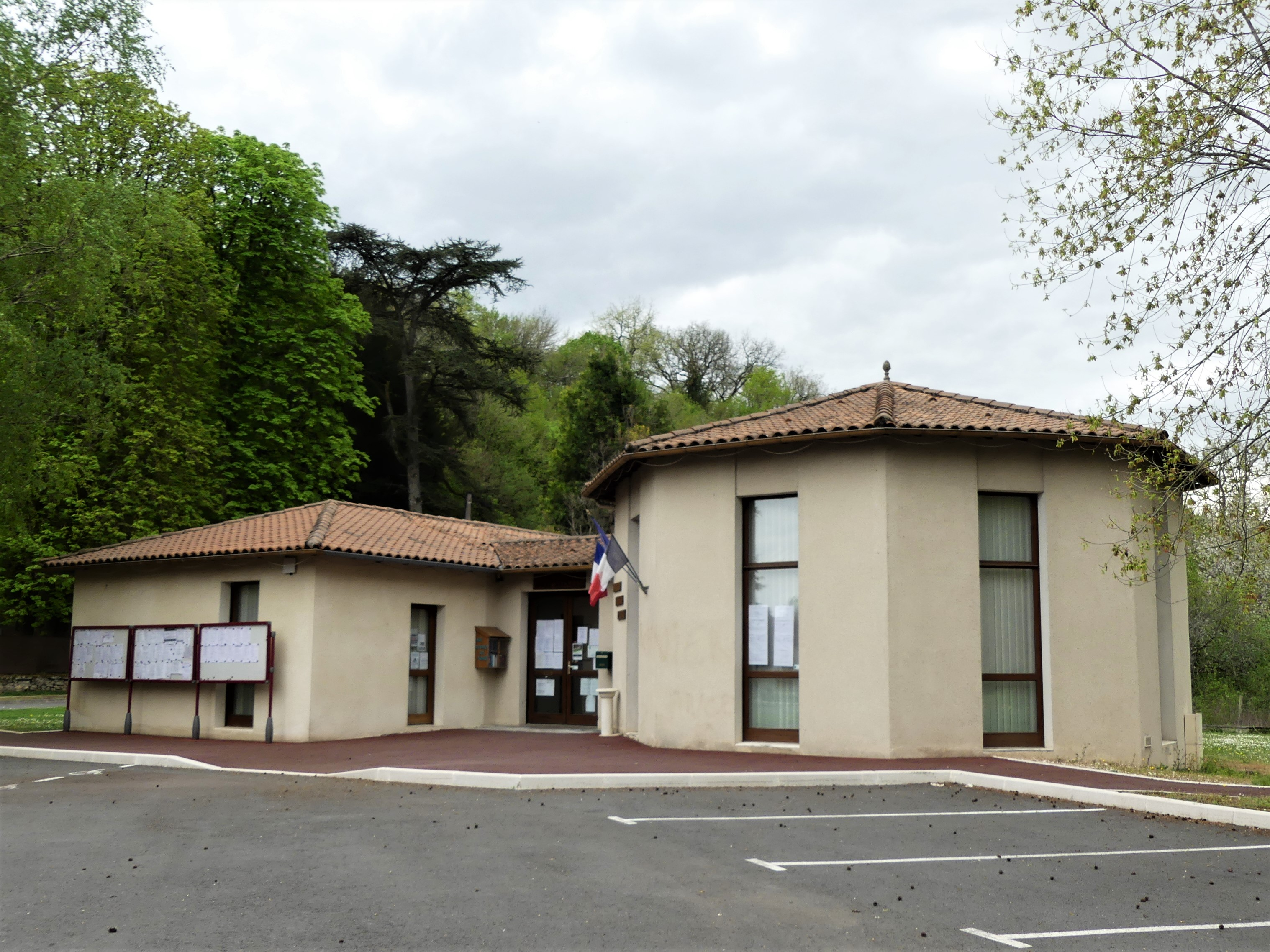 La mairie de Saint-Martial-de-Valette, Dordogne, France.